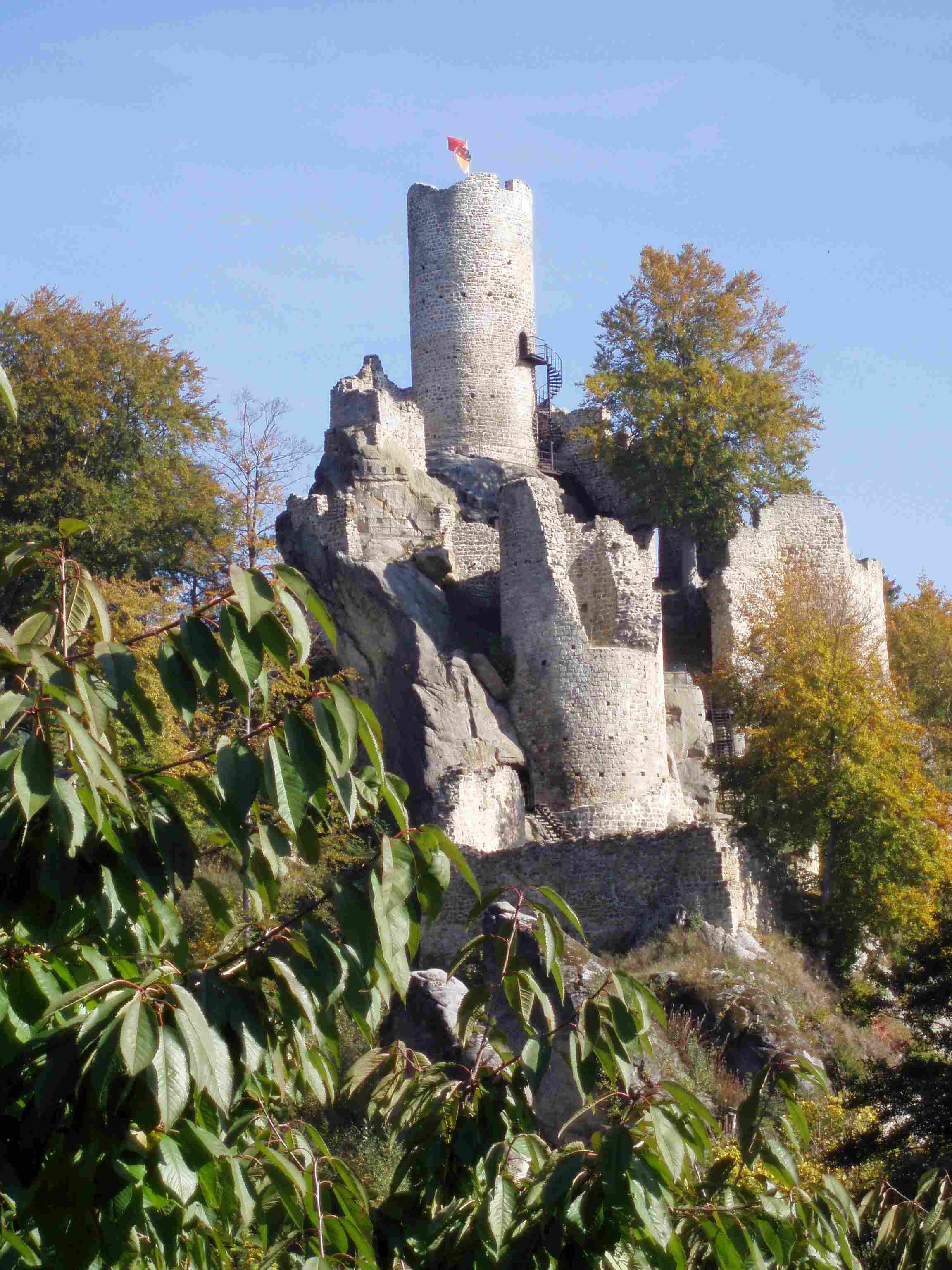 Burg Fridstein